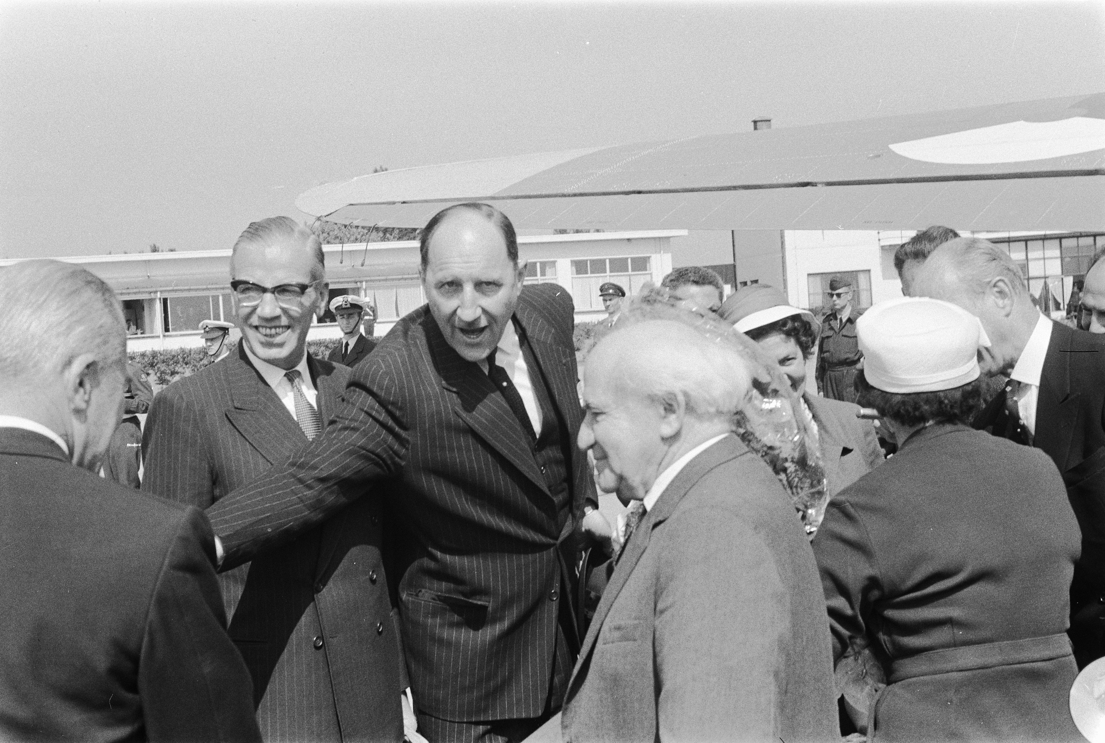 Collectie / Archief : Fotocollectie Anefo Reportage / Serie : [ onbekend ] Beschrijving : David Ben Goerion met echtgenote arriveert op Ypenburg Datum : 22 juni 1960 Locatie : Den Haag, Ypenburg, Zuid-Holland Trefwoorden : ECHTGENOTES Persoonsnaam : GOERION DAVID BEN Fotograaf : Pot, Harry / Anefo Auteursrechthebbende : Nationaal Archief Materiaalsoort : Negatief (zwart/wit) Nummer archiefinventaris : bekijk toegang 2.24.01.05 Bestanddeelnummer : 911-3571